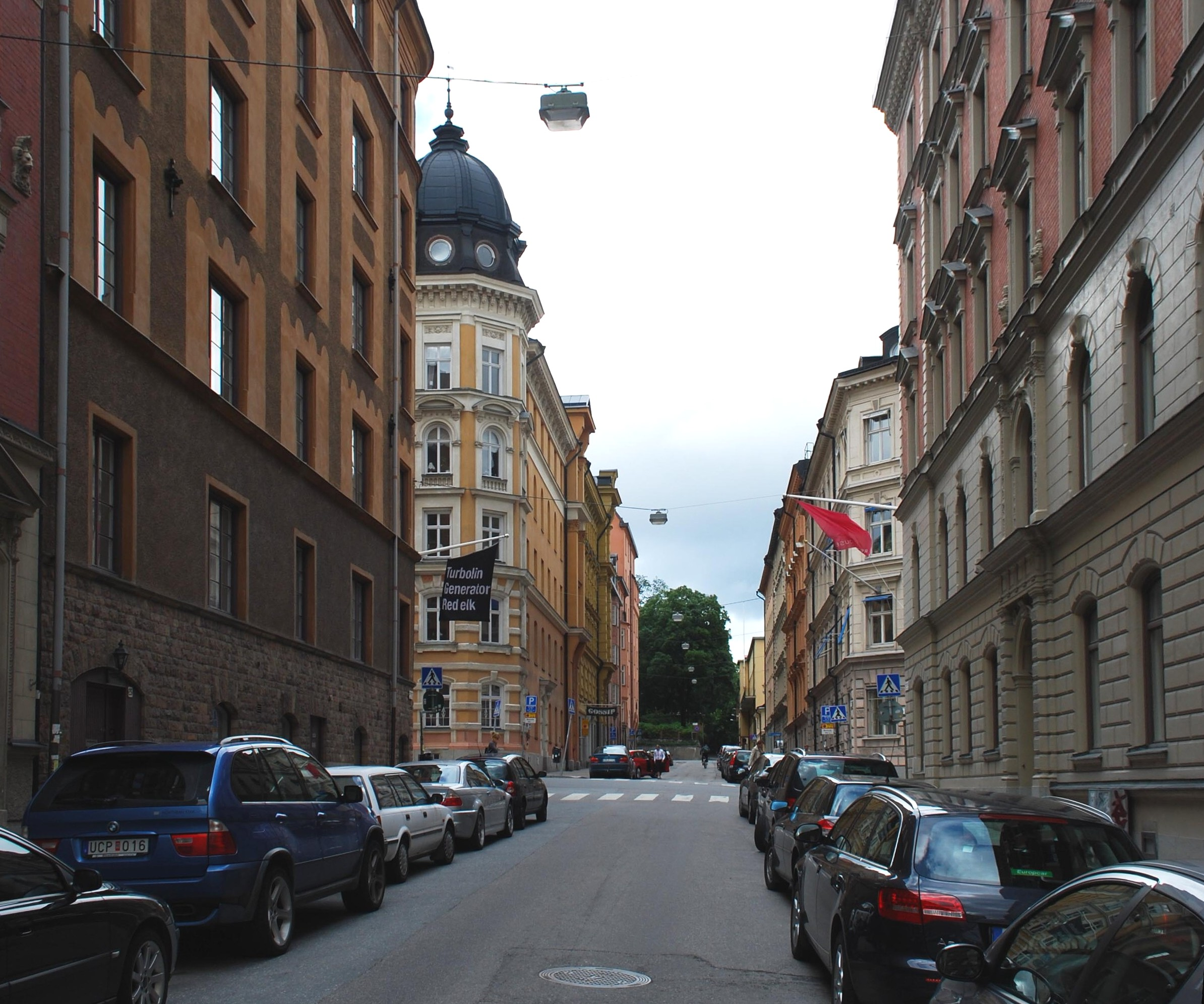 Hollandargatan norrut, sedd från Kammakargatan